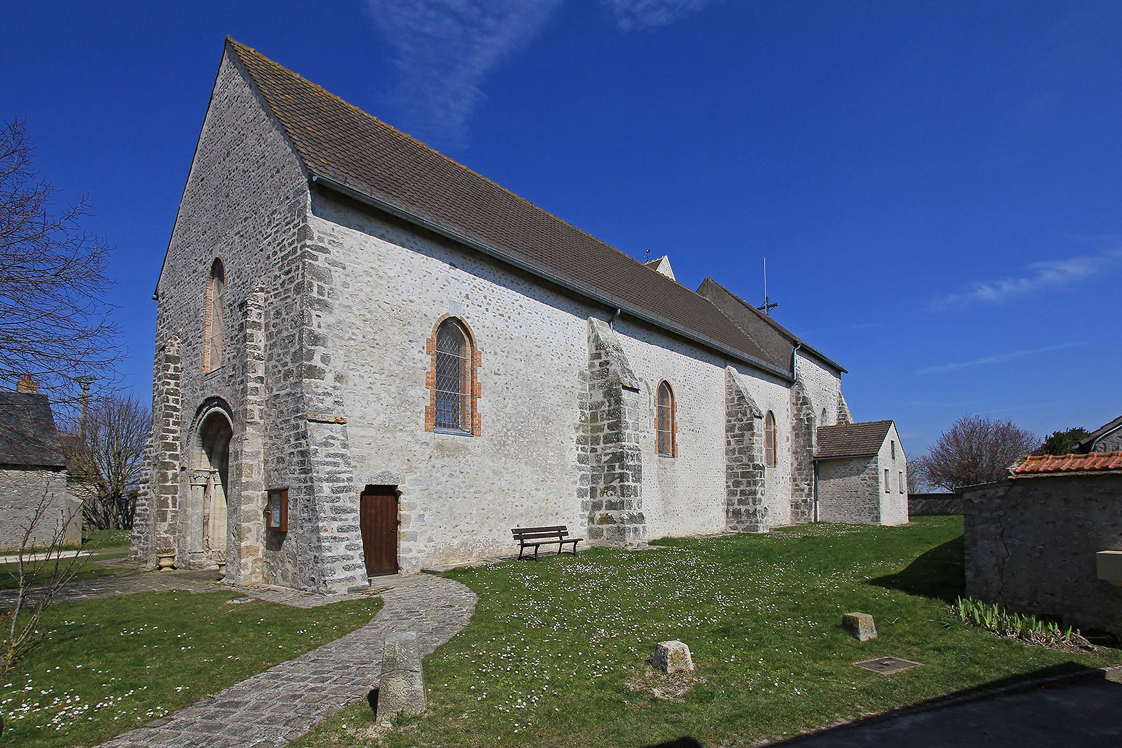 église de Brouy